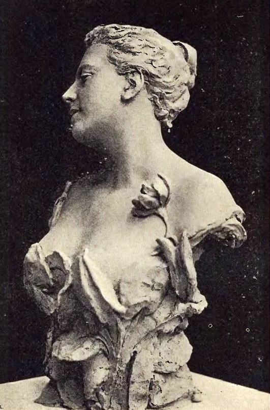 Lotus (biust gipsowy)